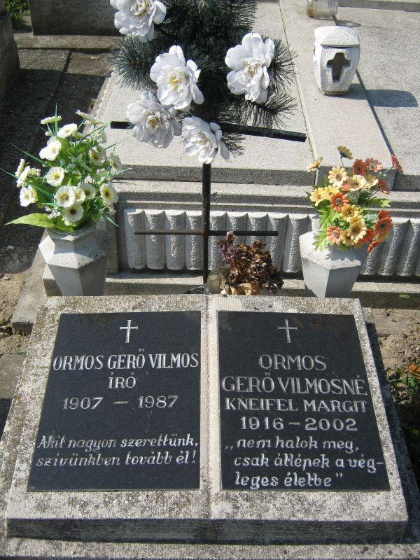 Literature